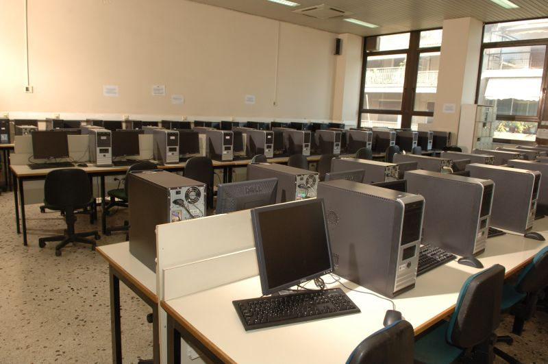 aueb computer center